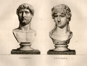 "Hadrien, Antinous" by French painter and printmaker Pierre Bouillon. Plate from Musée des antiques, dessiné et gravé par P. Bouillon, avec des notices explicatives par J. B. de Saint-Victor, 3 volumes, 1810-1821.